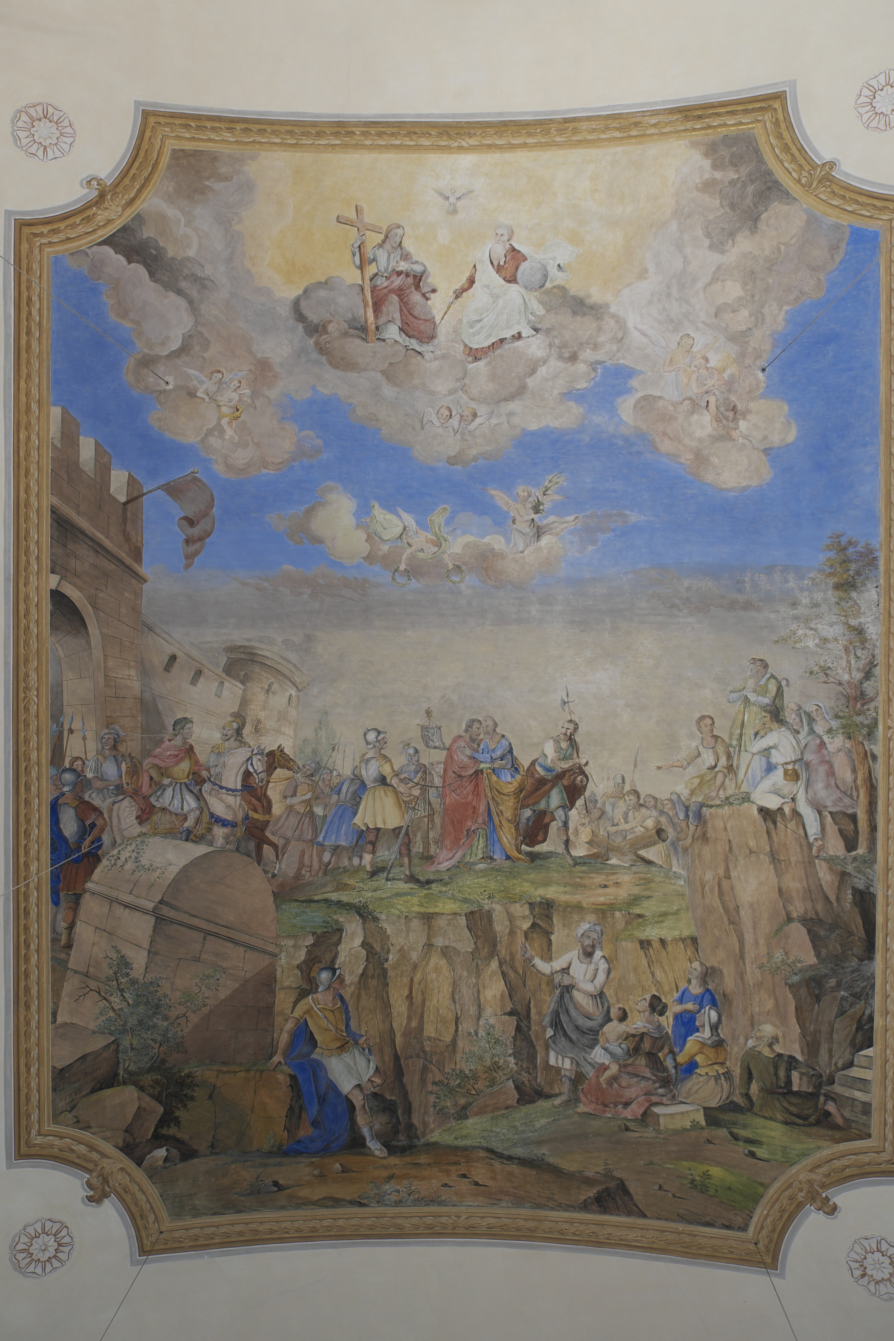 Katholische Pfarrkirche St. Peter und Paul in Oberigling (Igling) im oberbayerischen Landkreis Landsberg am Lech (Bayern/Deutschland), Deckengemälde im Langhaus von Karl Vorhölzer, von 1853; Darstellung: Apostel Petrus und Paulus